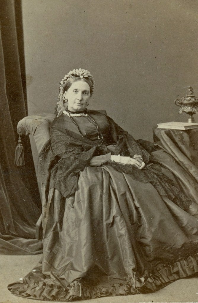 Графиня Екатерина Федоровна Тизенгаузен (1803–1888)